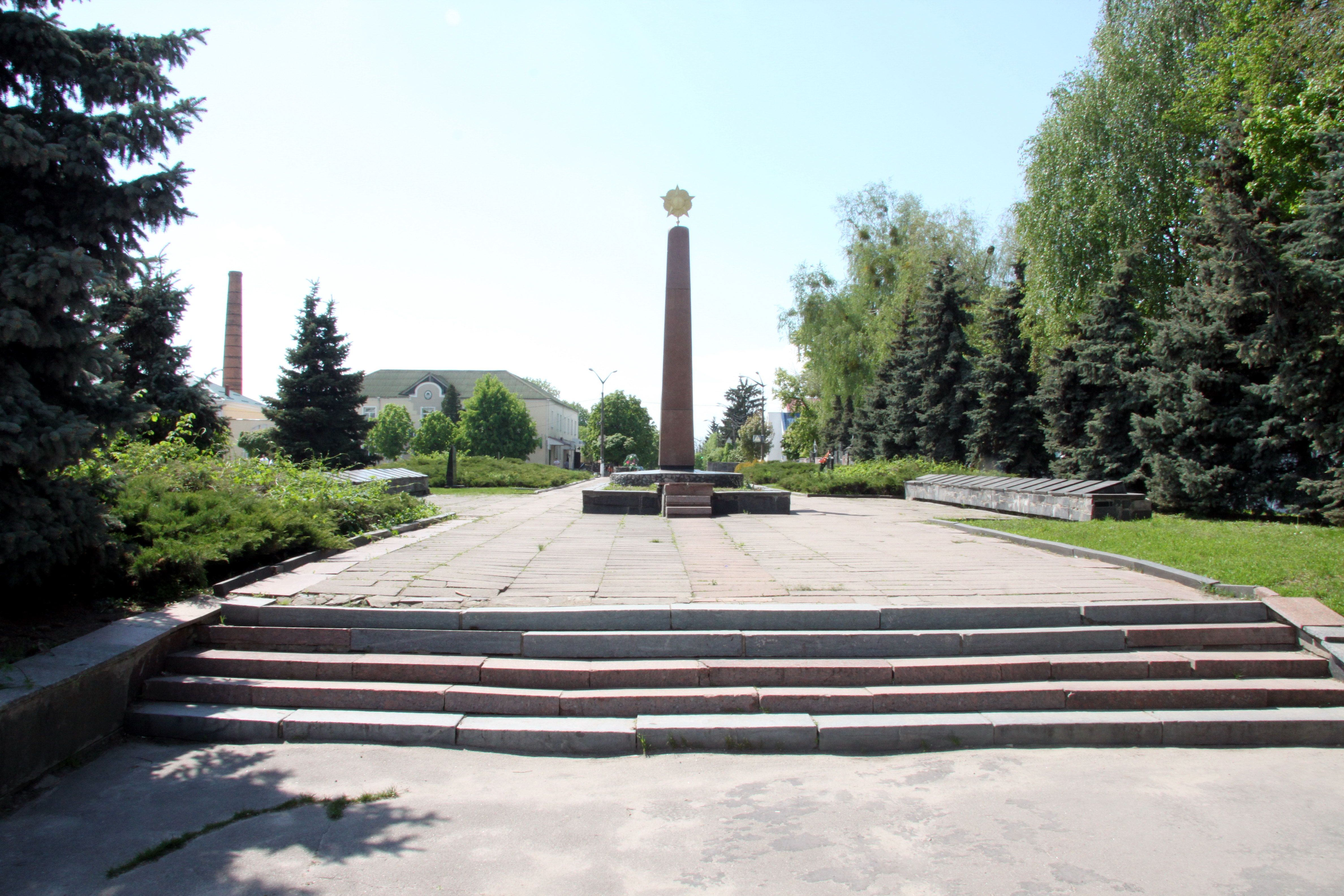 Меморіал Слави загиблим воїнам під час Великої Вітчизняної війни, майдан Соборний, Радомишль